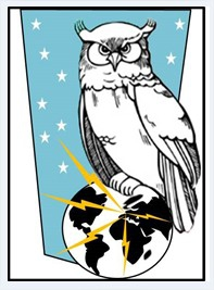 Insigne du commandement du renseignement